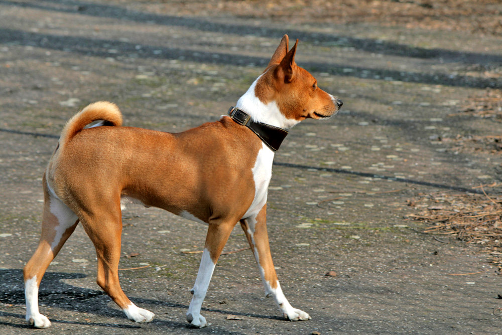 camminare da... basenji